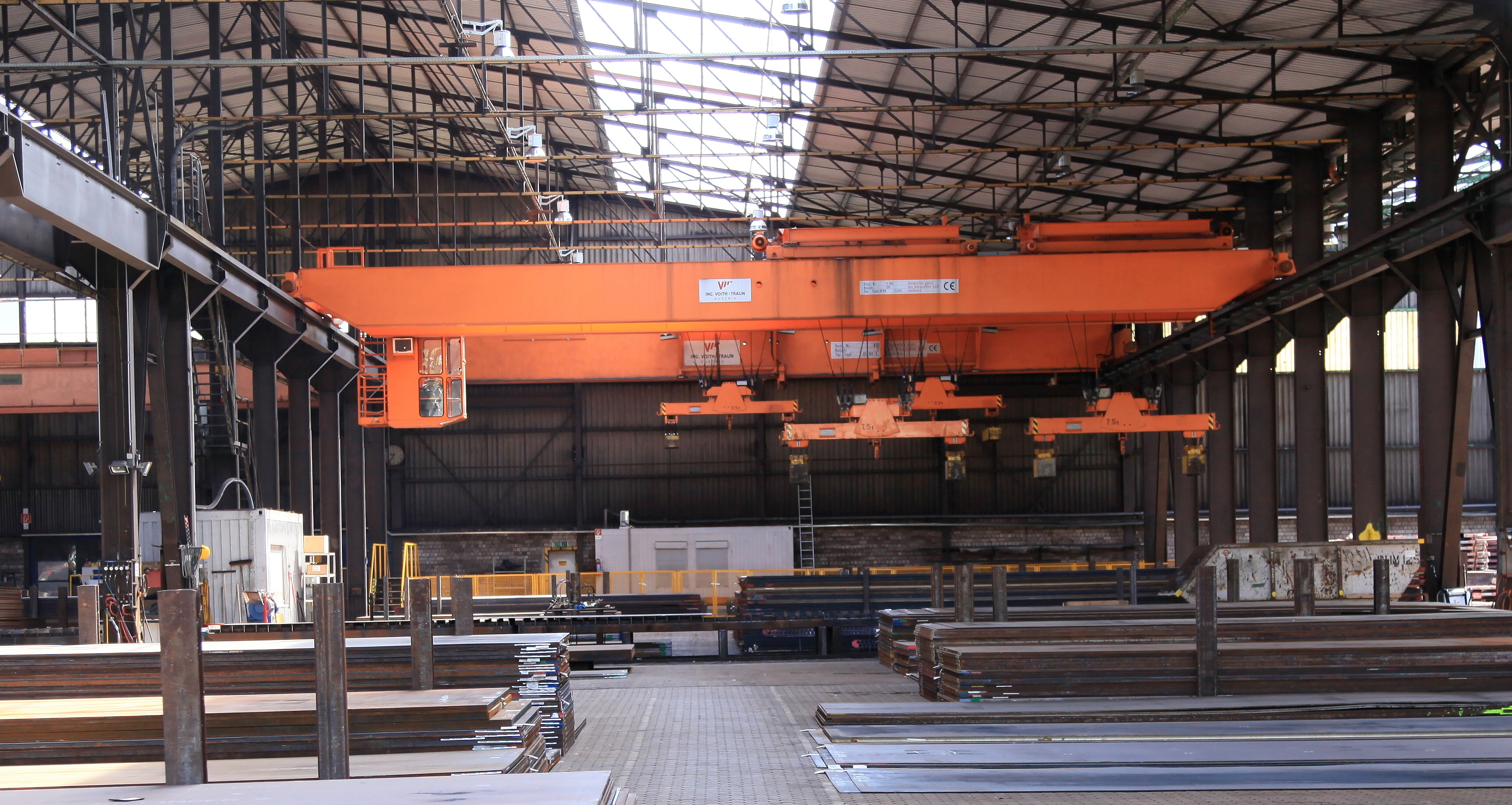 Ancofer Stahlhandel, Am Nordhafen in Mülheim an der Ruhr. Kranhersteller: Ing. A. Fritz Voith Ges.m.b.H & Co KG 4050 Traun Österreich